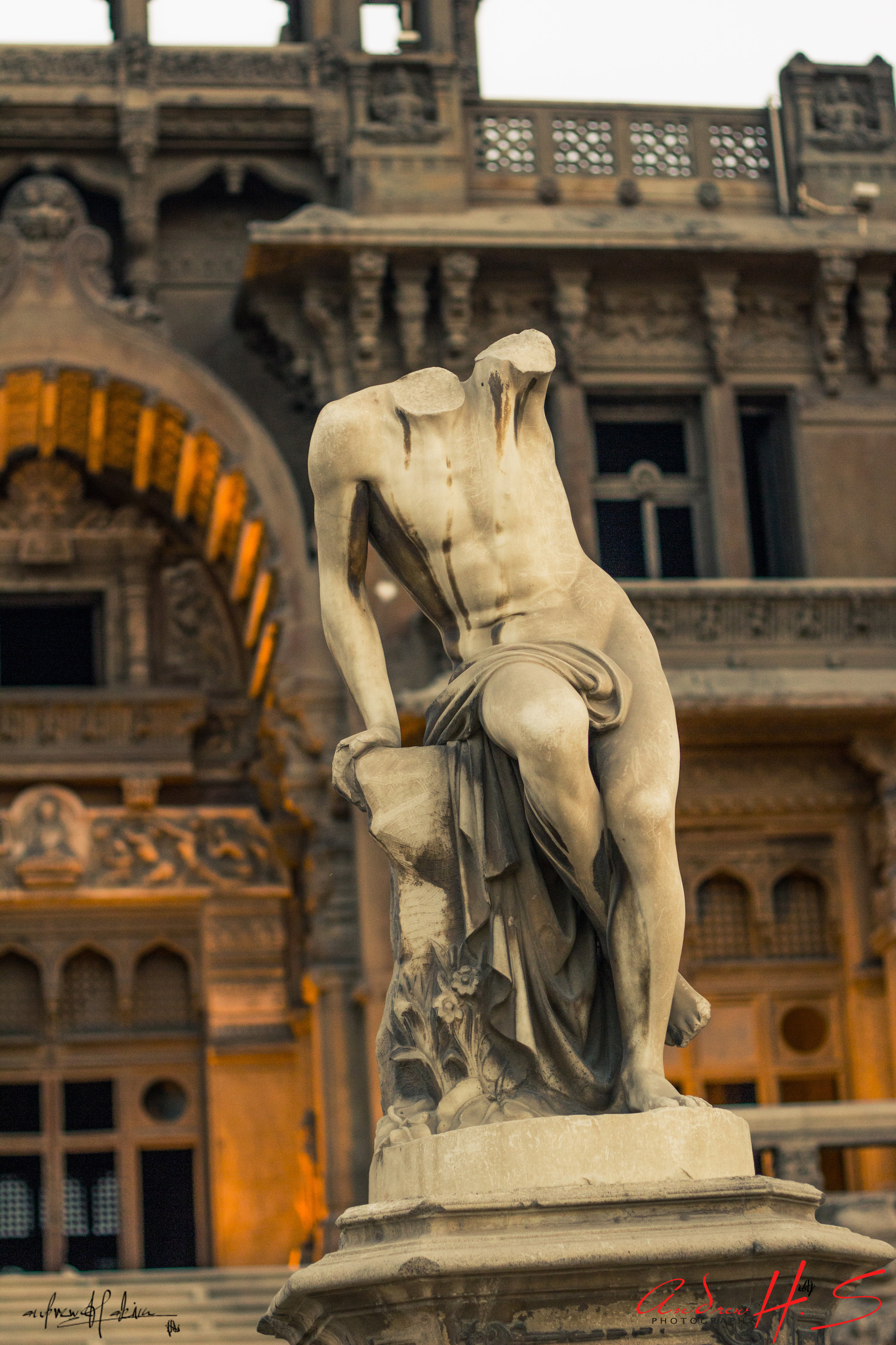 the baron empain palace